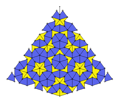 Pavage de Penrose avec cerf-volants et fléchettes. Image personnelle.